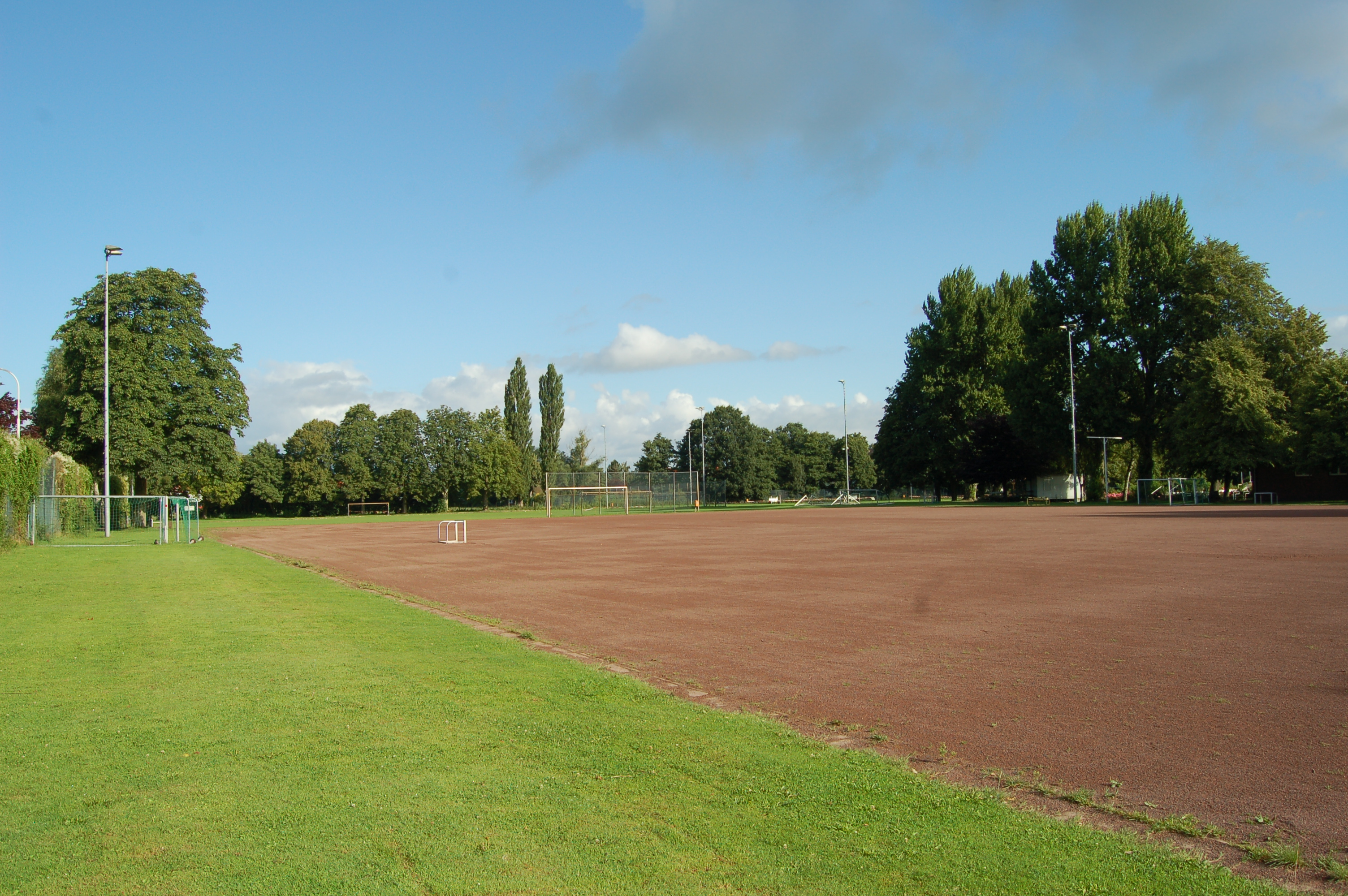 Der Grandplatz des "Rosenstadion" in Uetersen. Das Rosenstadion besitzt insgesamt vier Spielfelder und eine Turnhalle.